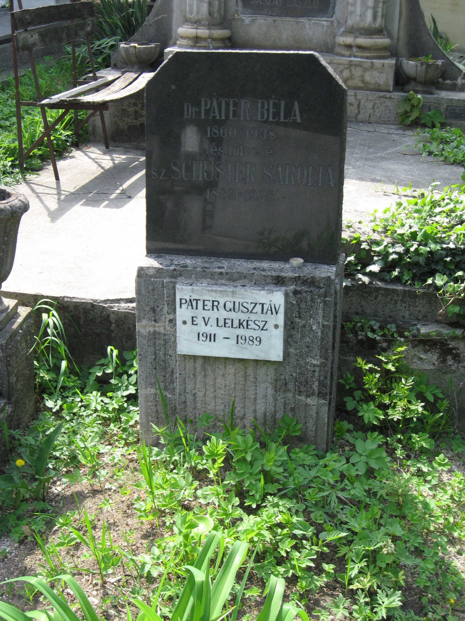 Házsongárdi temető: Páter Béla sírja